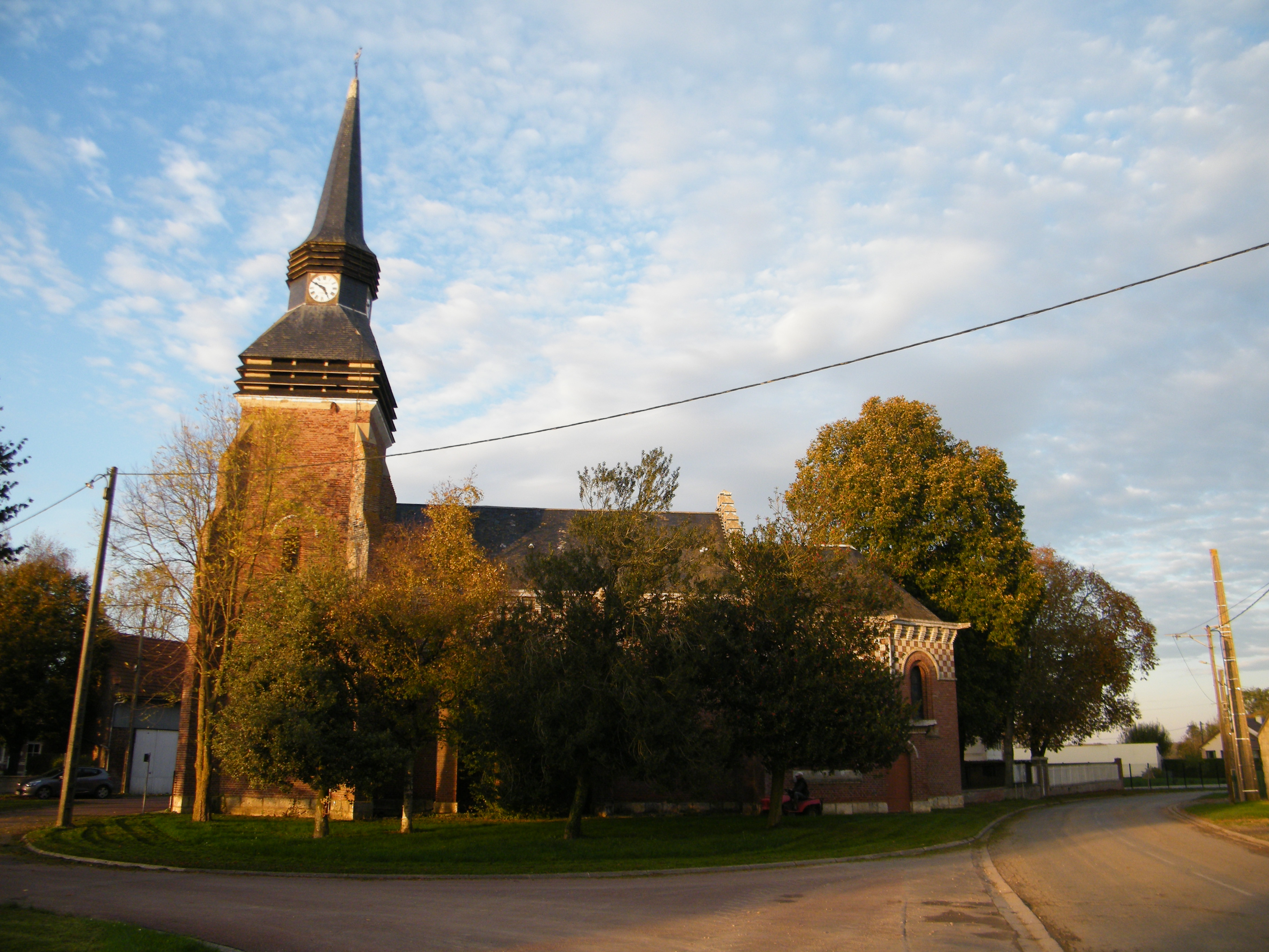 église.